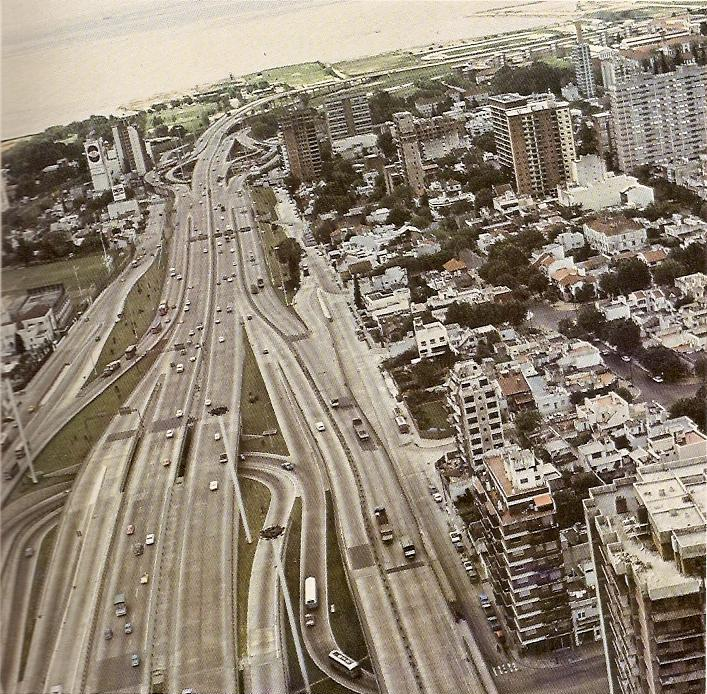 La Avenida General Paz, desde el Puente Saavedra (Avenida Cabildo/Maipú) hacia Avenida del Libertador y el Río de la Plata, hacia fines de los '70s. Buenos Aires, Argentina.